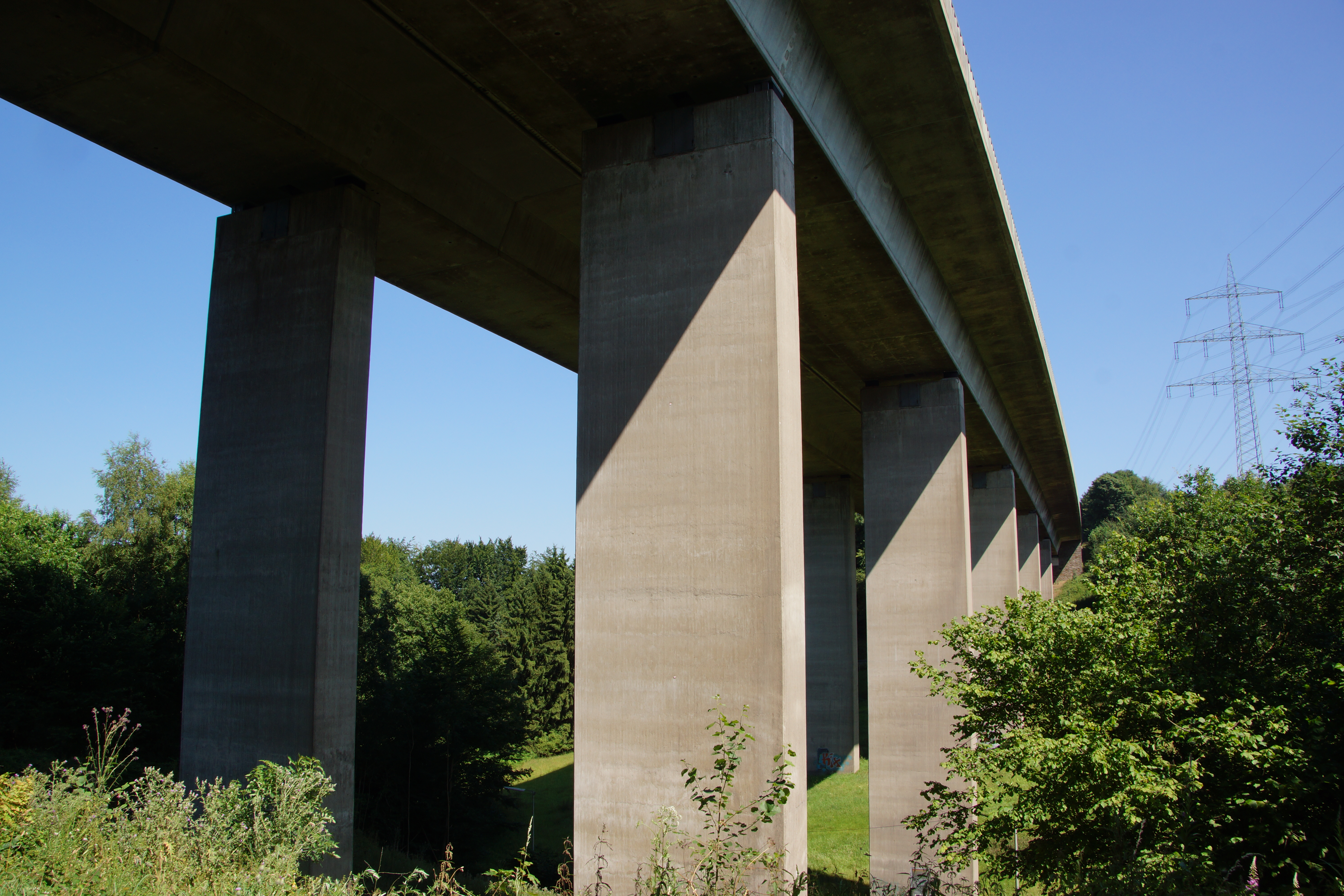 Talbrücke Hunstig bei Oberbantenberg